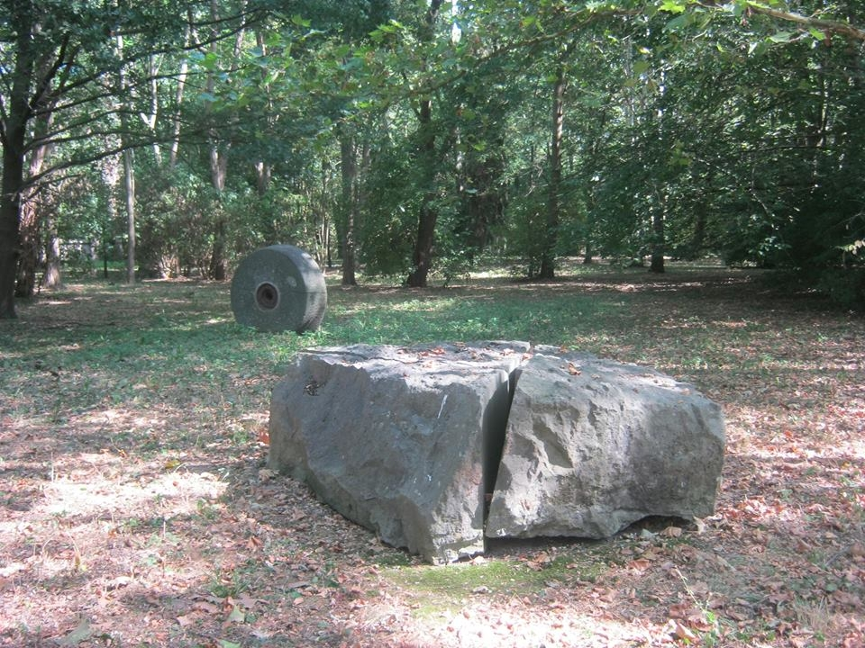 Mit diesem Stein wird das Auseinanderreißen des Ortes durch den Abbruch dargestellt.